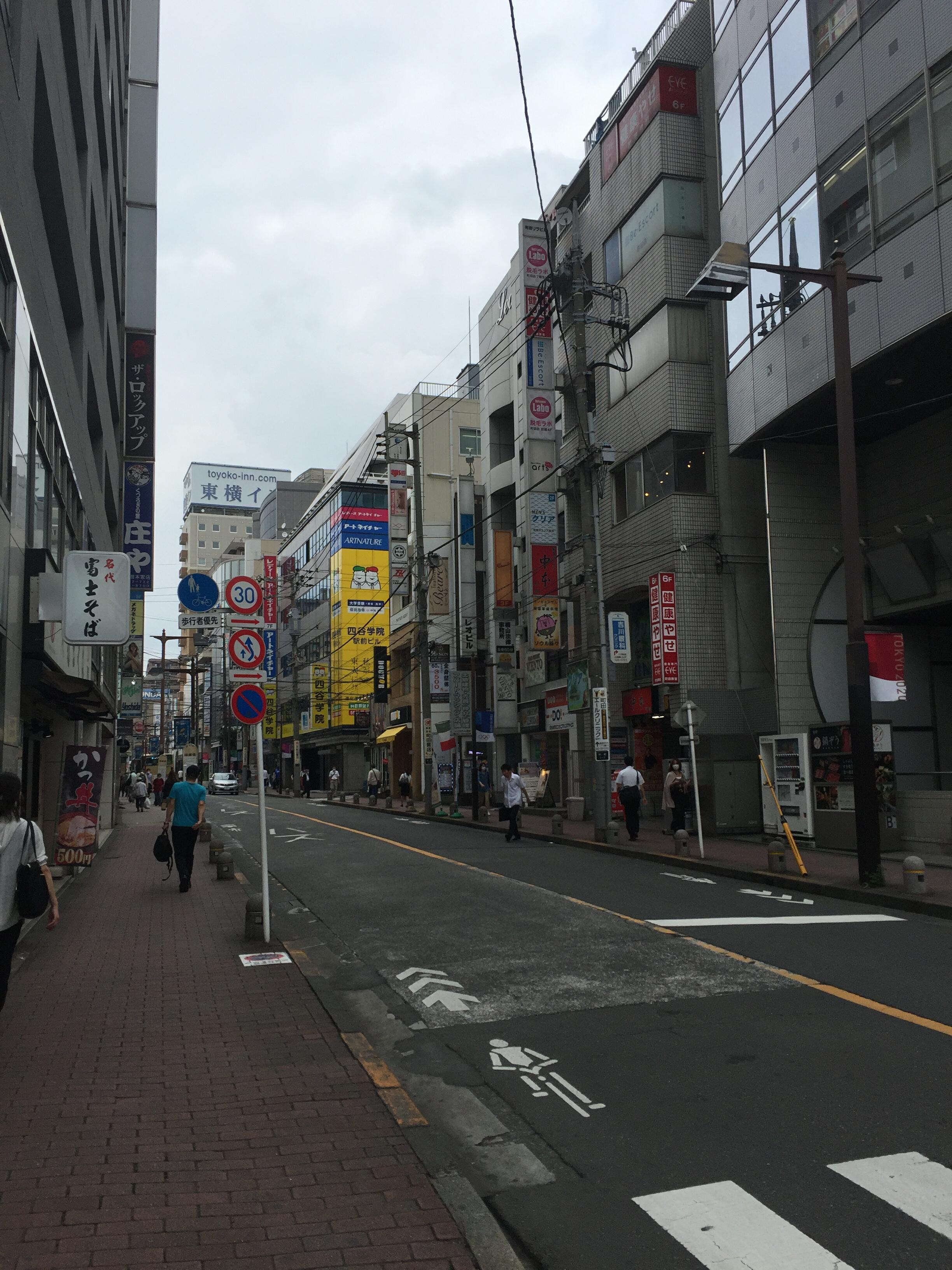 旧町田街道となる栄通り（町田市森野一丁目・玉川学園前8号踏切前）。町田駅を発着するバス乗り場がある。